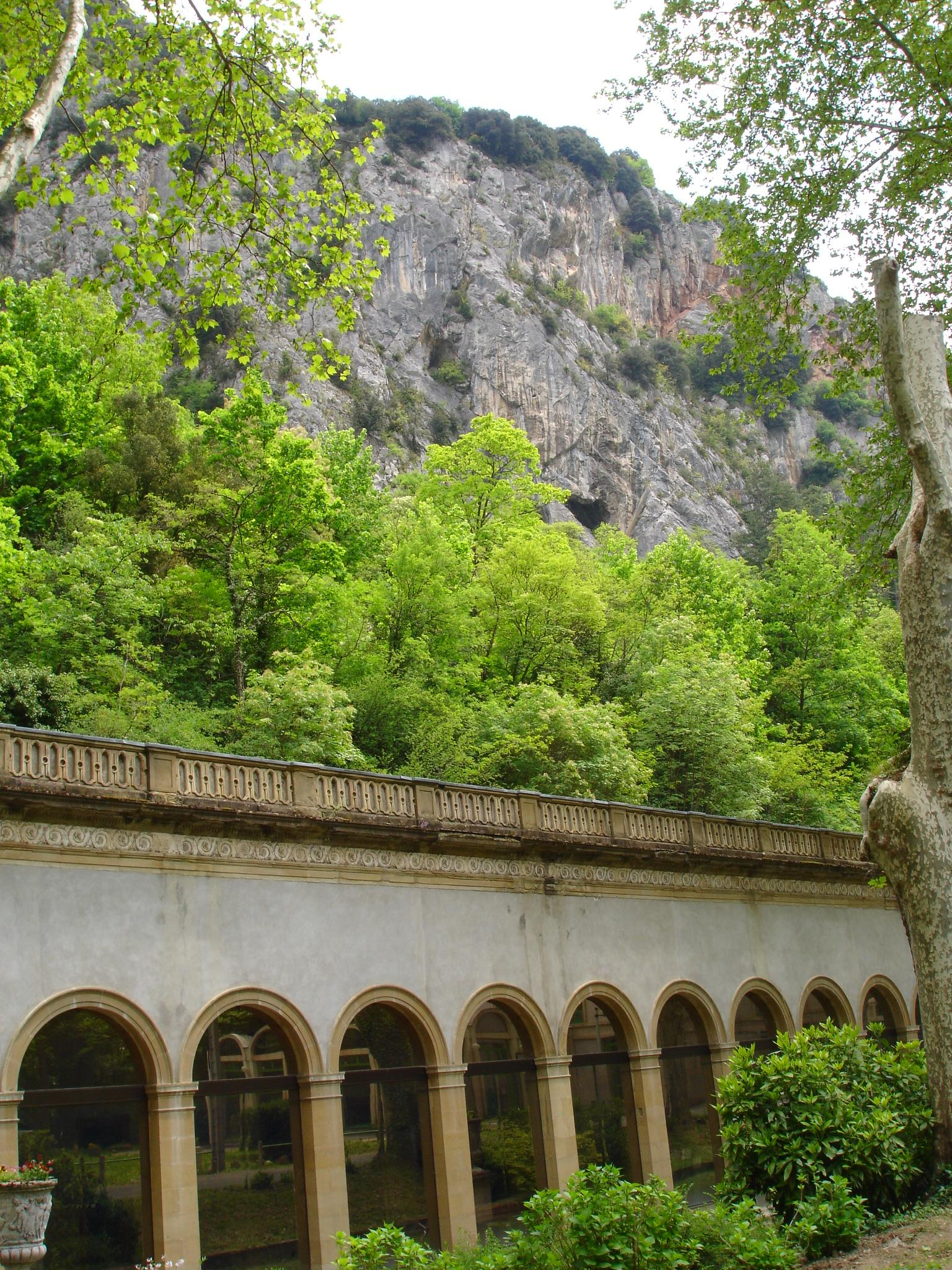 Les thermes d'Ussat-Les-bains, Ariège (09), France